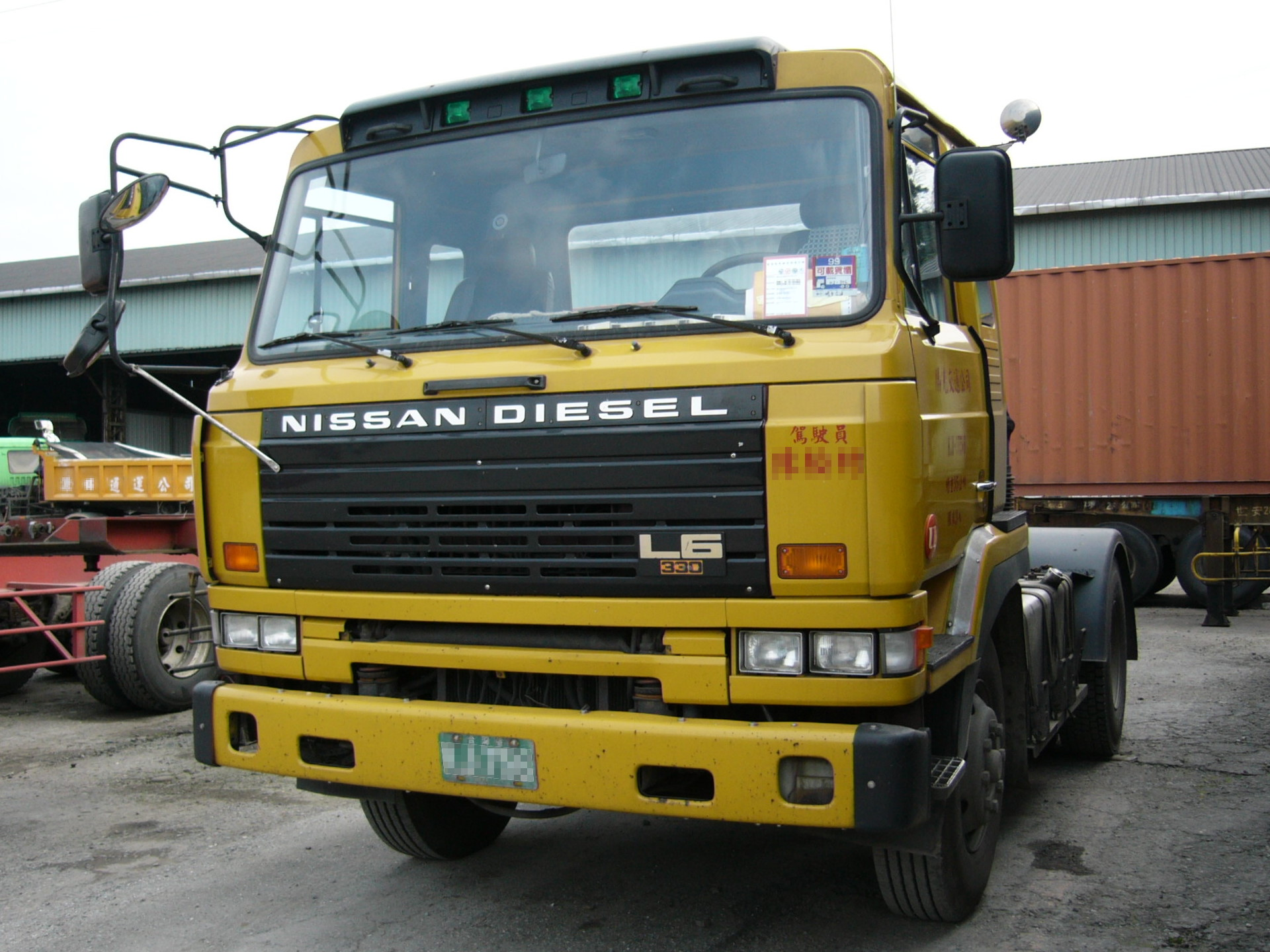 中文（台灣）: 台灣的Nissan Diesel L6 330曳引車